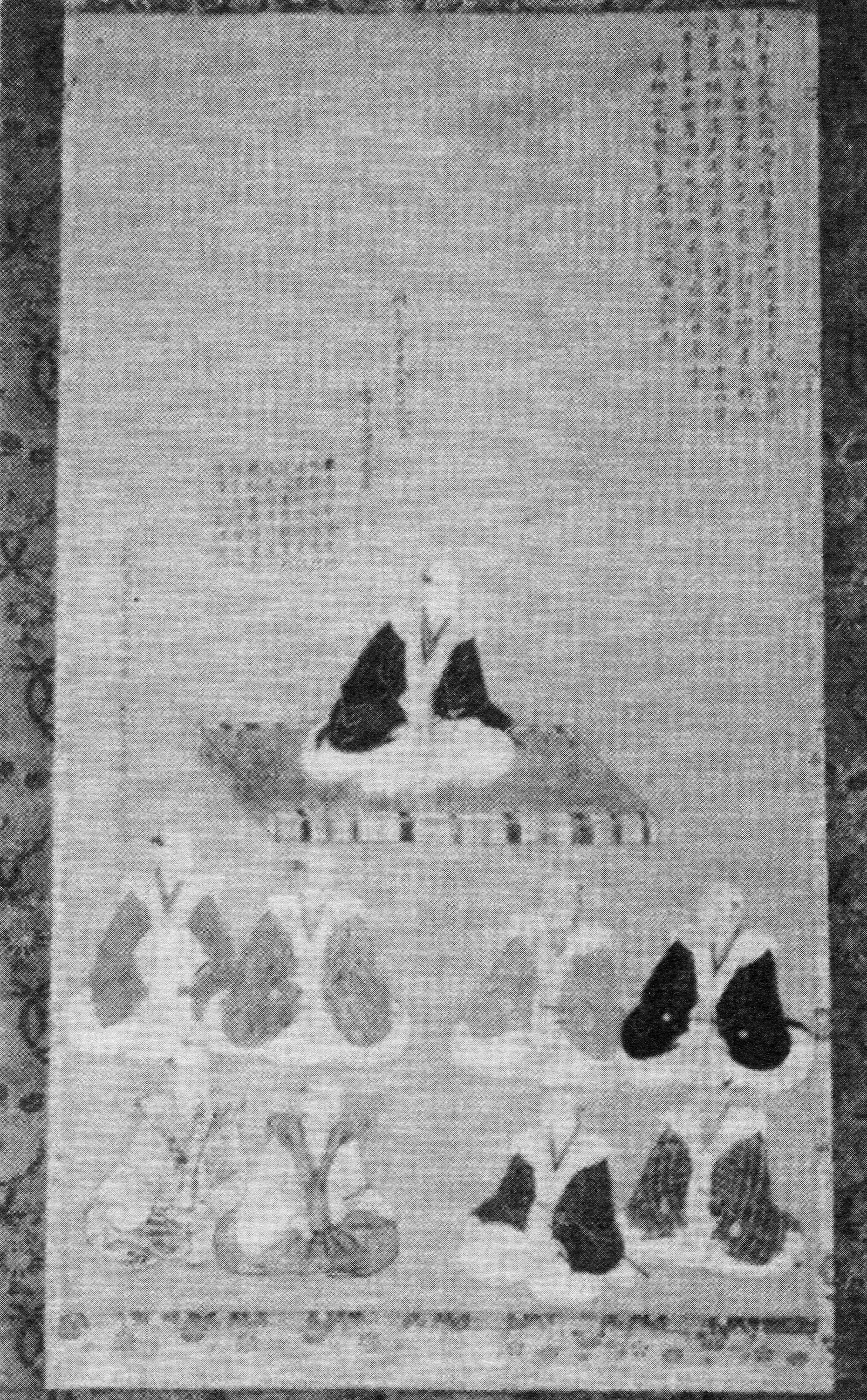 水沢伊達氏2代留守宗利の肖像画。